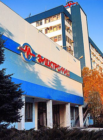 Научно-производственное закрытое акционерное общество Электромаш